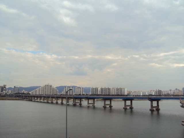 천호동방향을 향해 찍은 천호대교